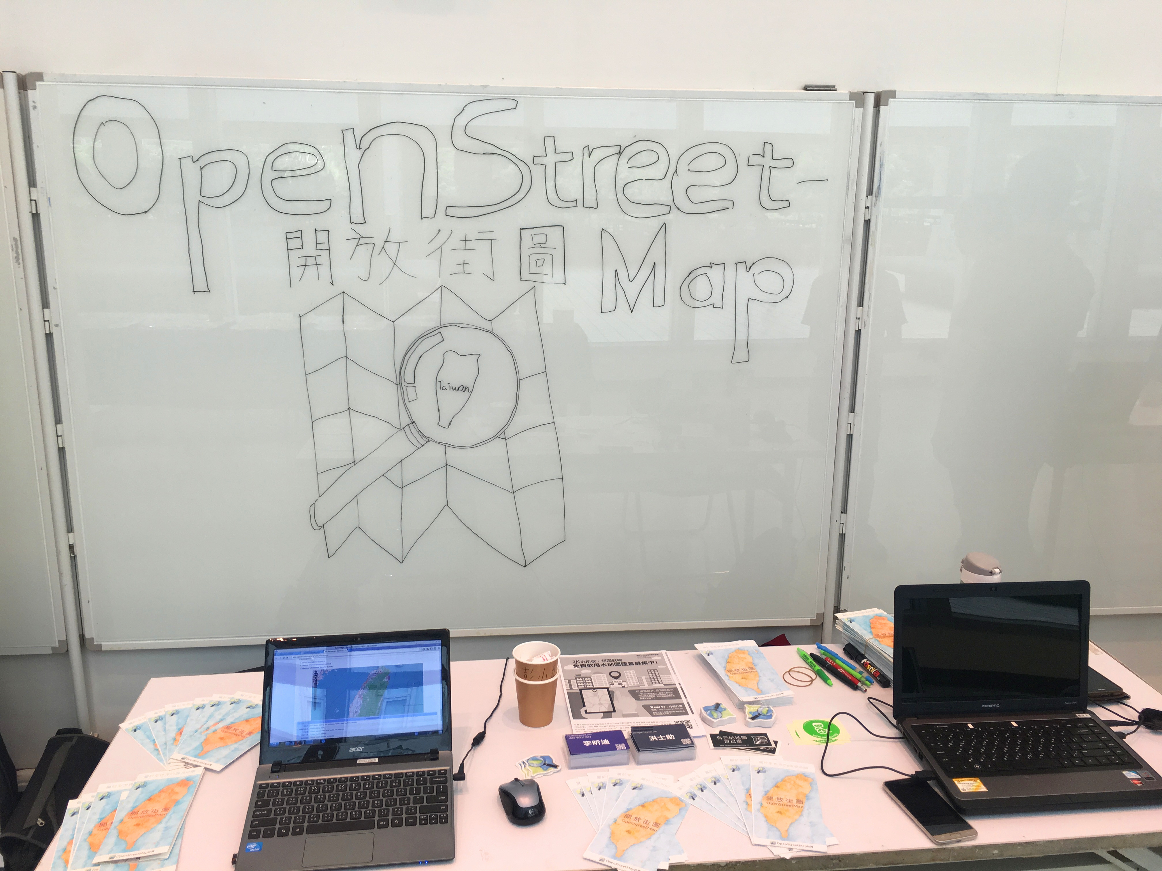 中文（中国大陆）: COSCUP 2016上的台湾OpenStreetMap社群摊位